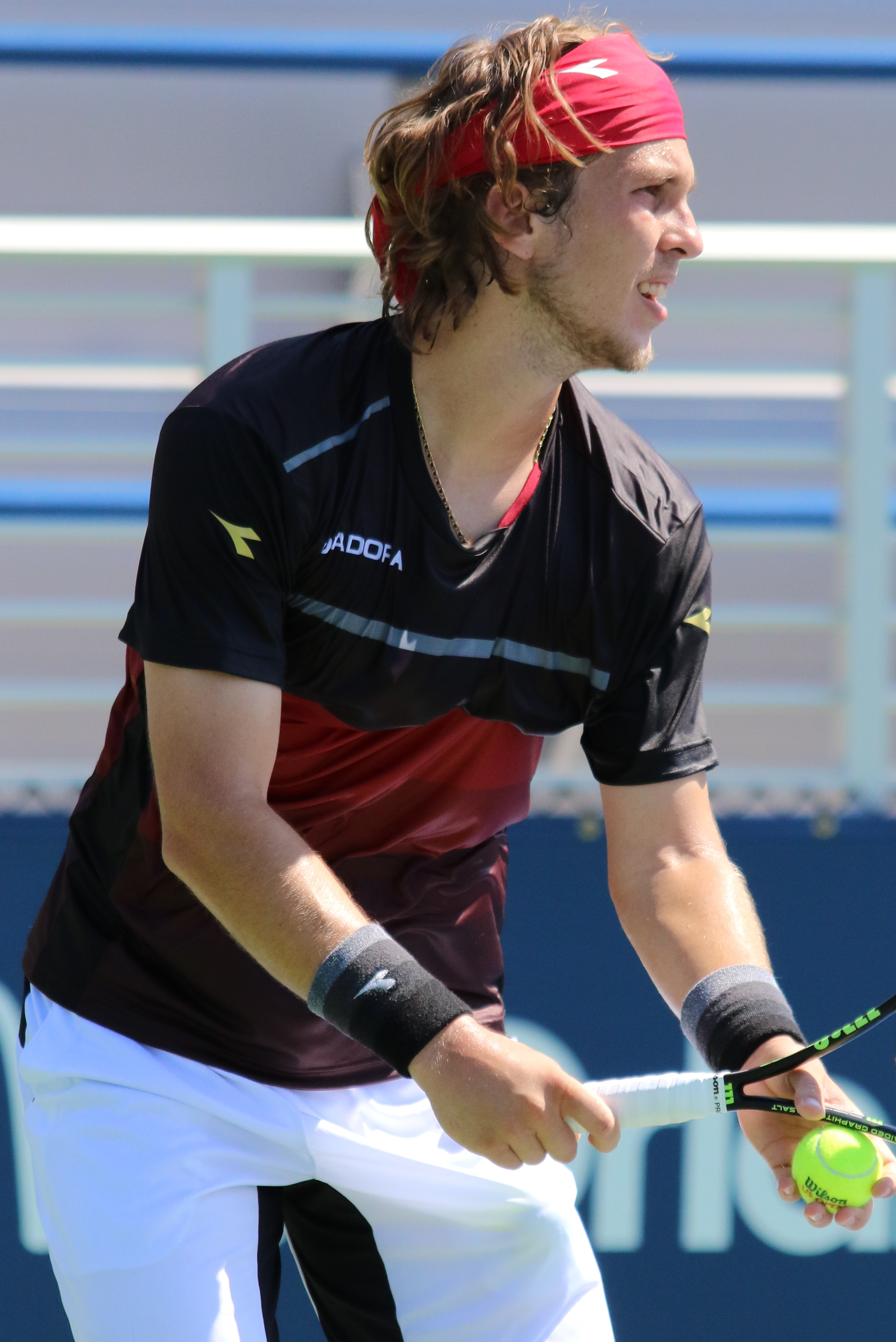 Lacko US16 (12)